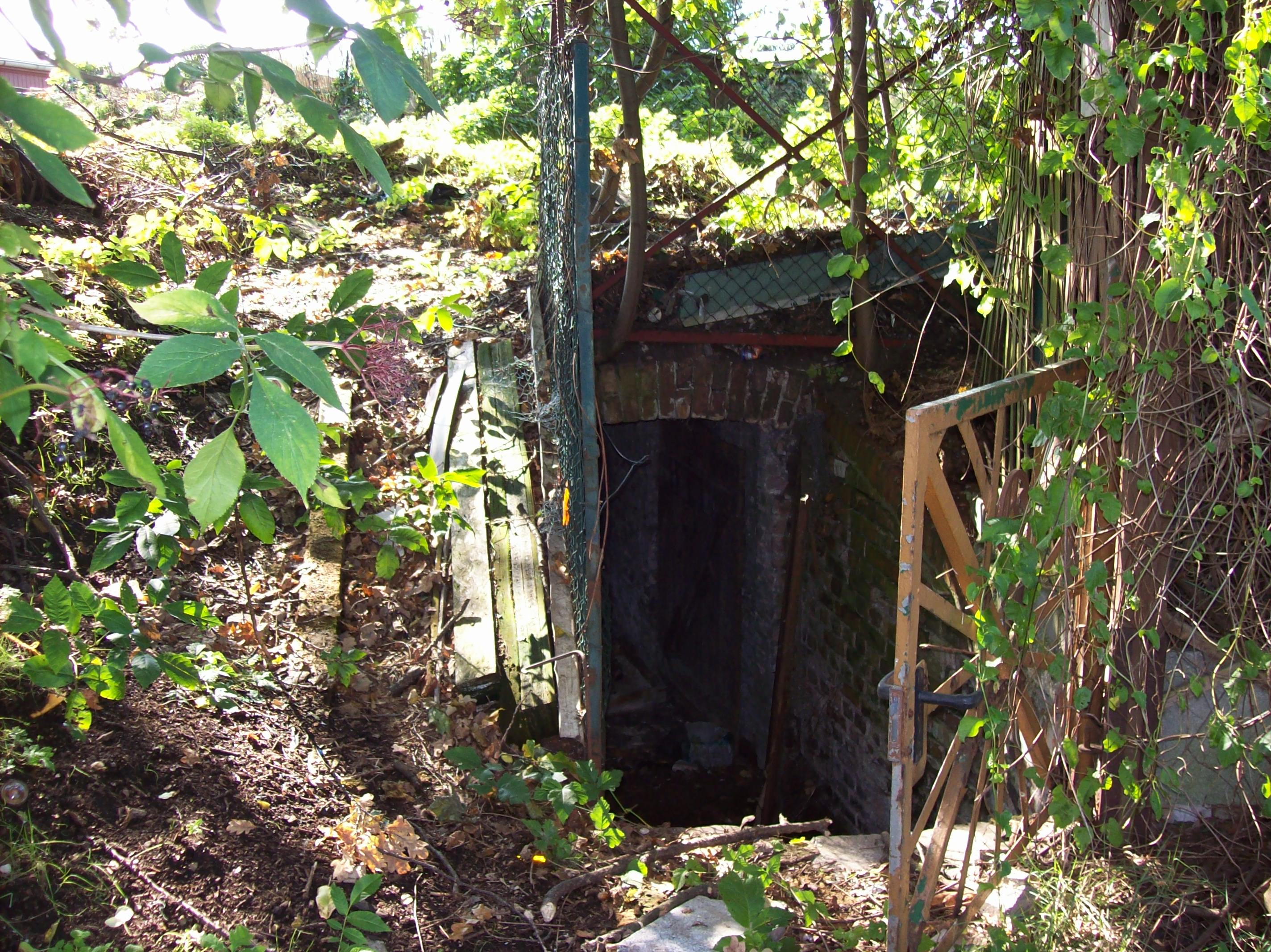 Denkmalgeschütztes Objekt Deutschland Berlin Nummer 09030386 Koloniestraße 57 Erdkeller